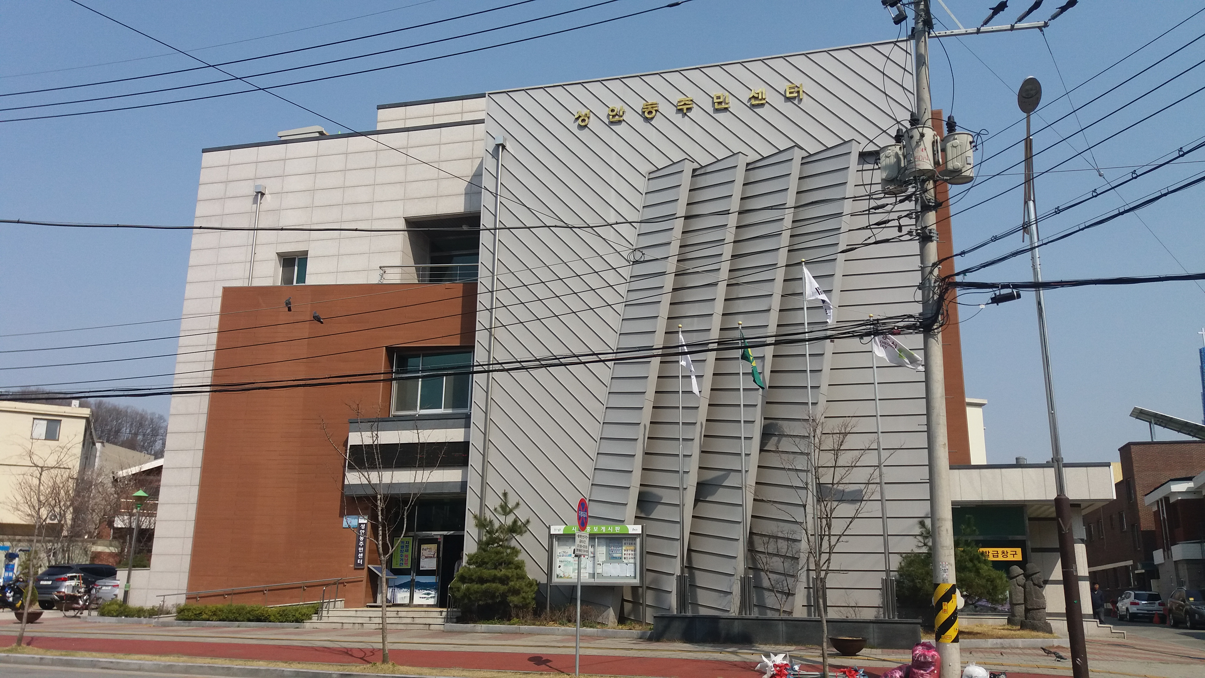 성안동사무소